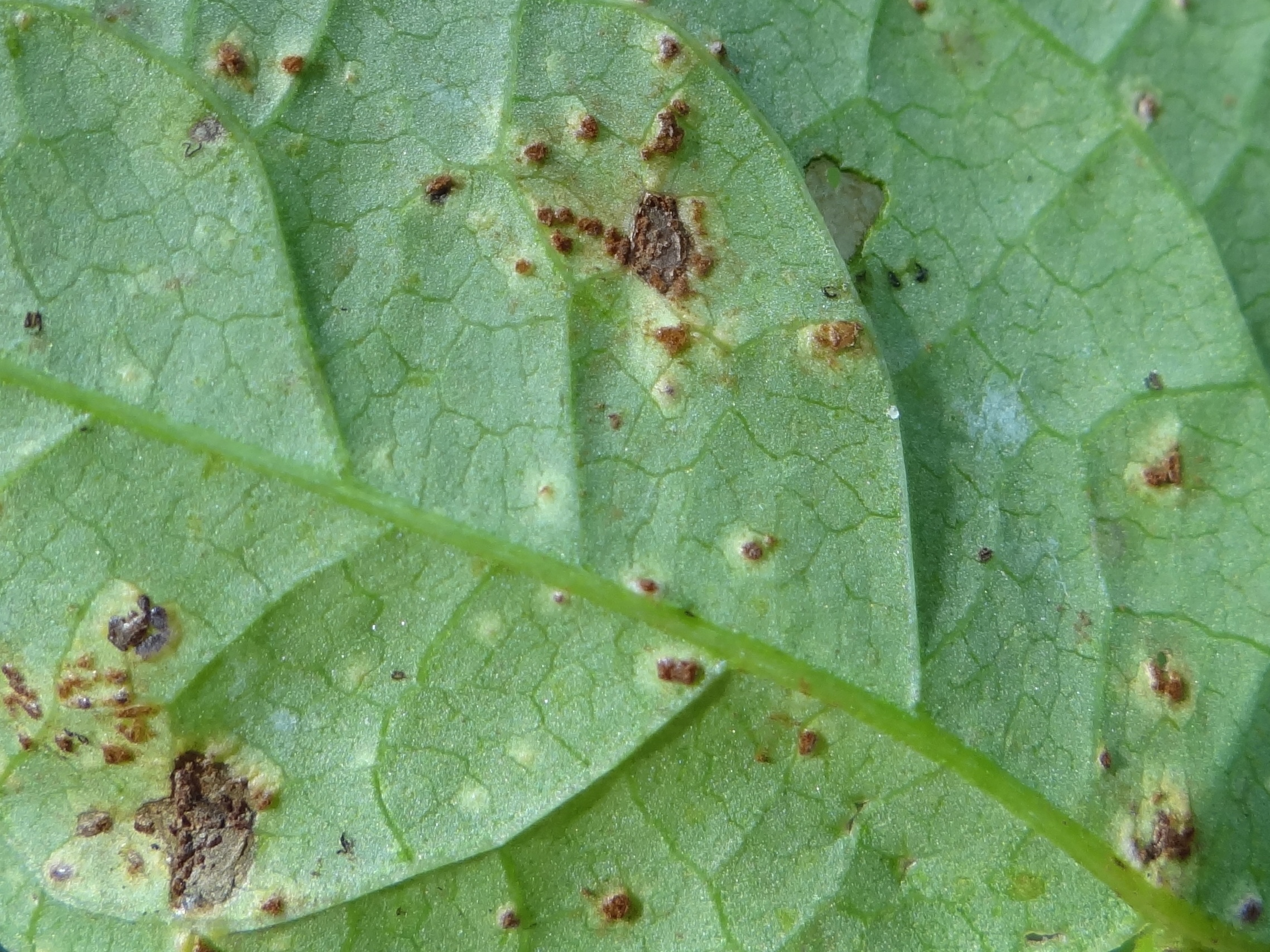 Puccinia convolvuli (uredium) on Calystegia sepium